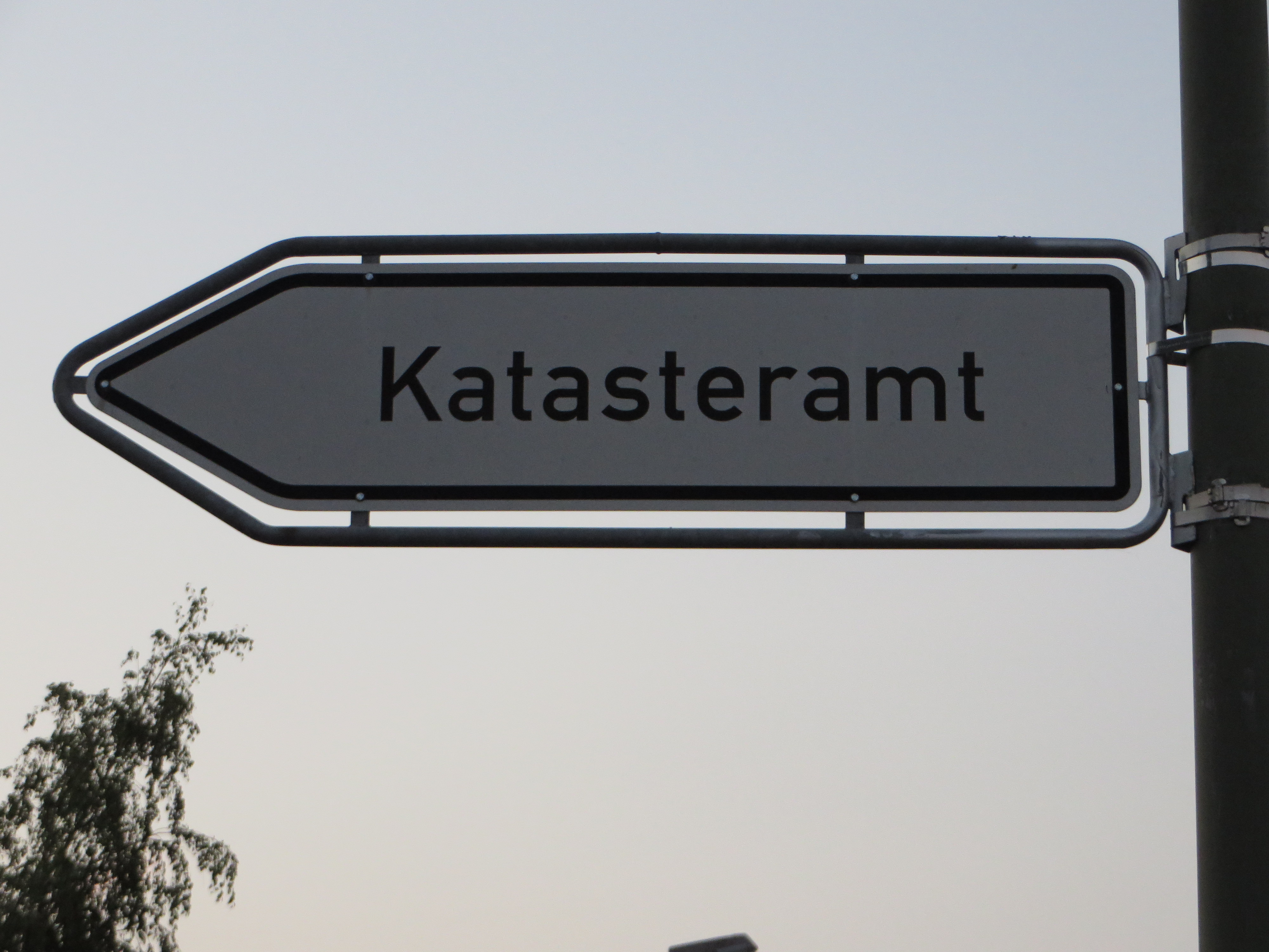 Hinweisschild Katasteramt